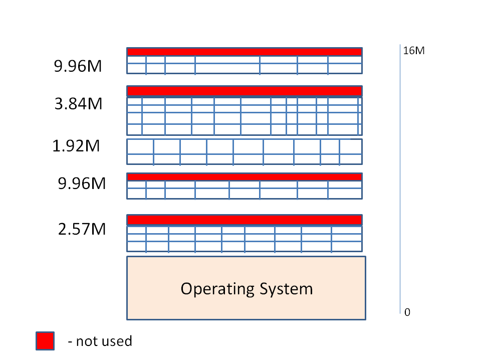 במחשבי מייינפריים SVS מבנה הזיכרון הוירטואלי במערכת ההפעלה Virtual Storage structure in SVS Mainframe Operating System